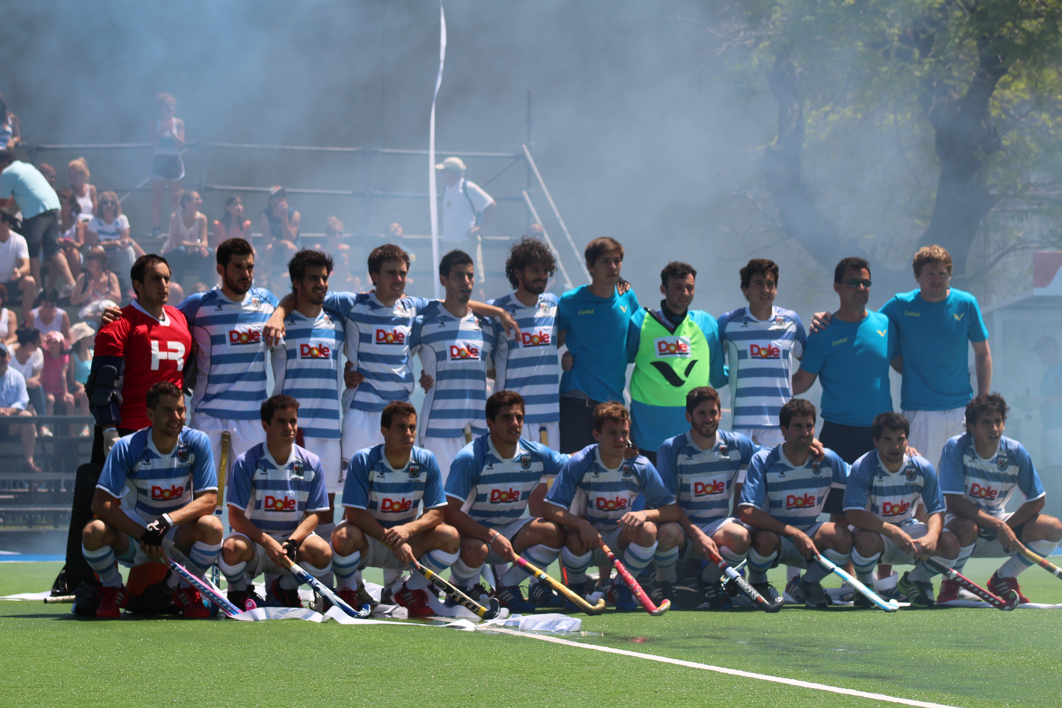 Play Off Campeones 2014